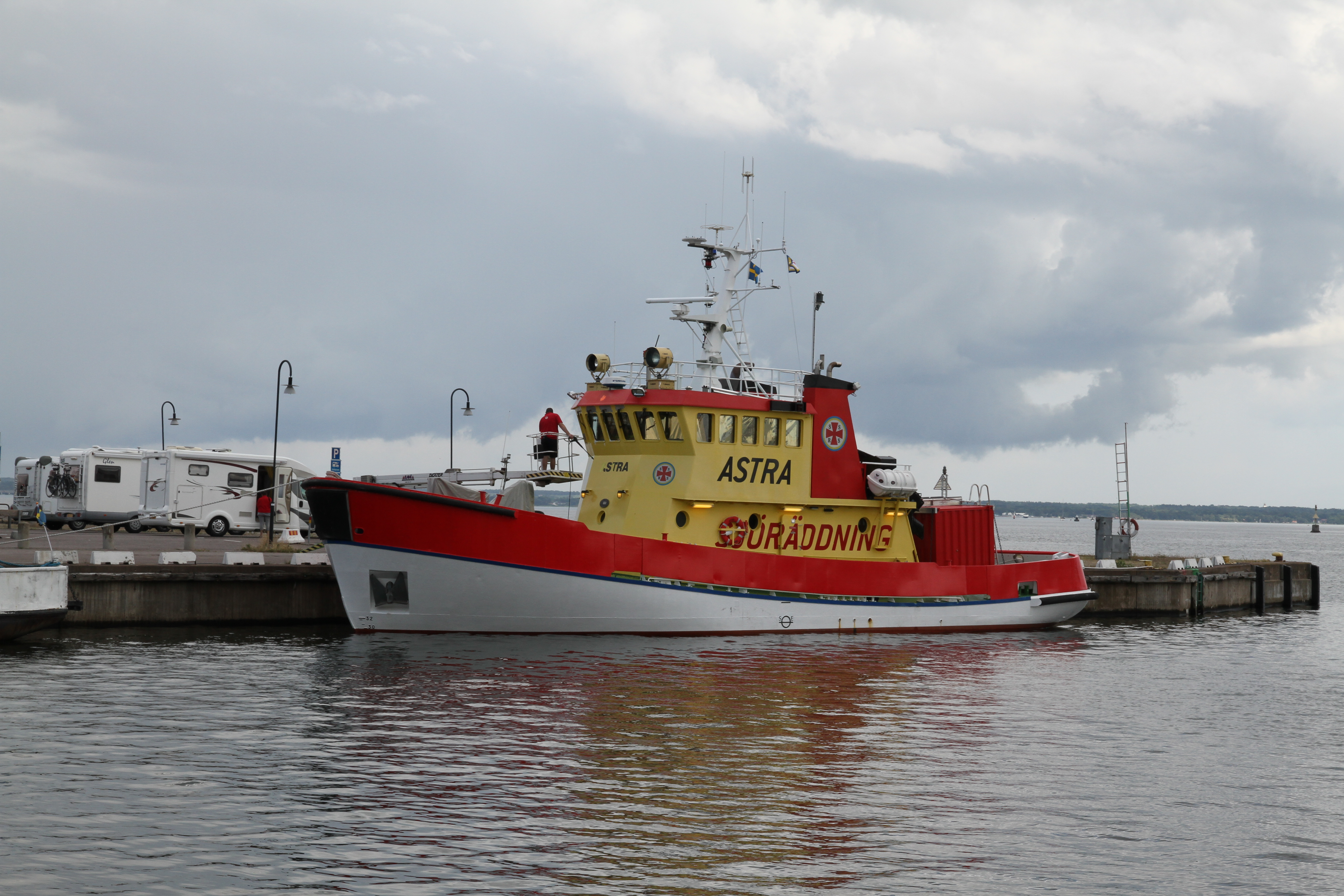 Rescue Astra i Kalmar 14 juli 2015